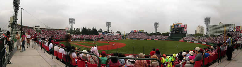 2005年3月に完成した第一期のフルキャストスタジアム宮城。 撮影日は2005年9月11日(東北楽天対福岡ソフトバンク)。 投稿者により撮影。 2005年9月15日 (木) 12:58 . . Gomurafuji . . 800×222 (30,033 バイト)